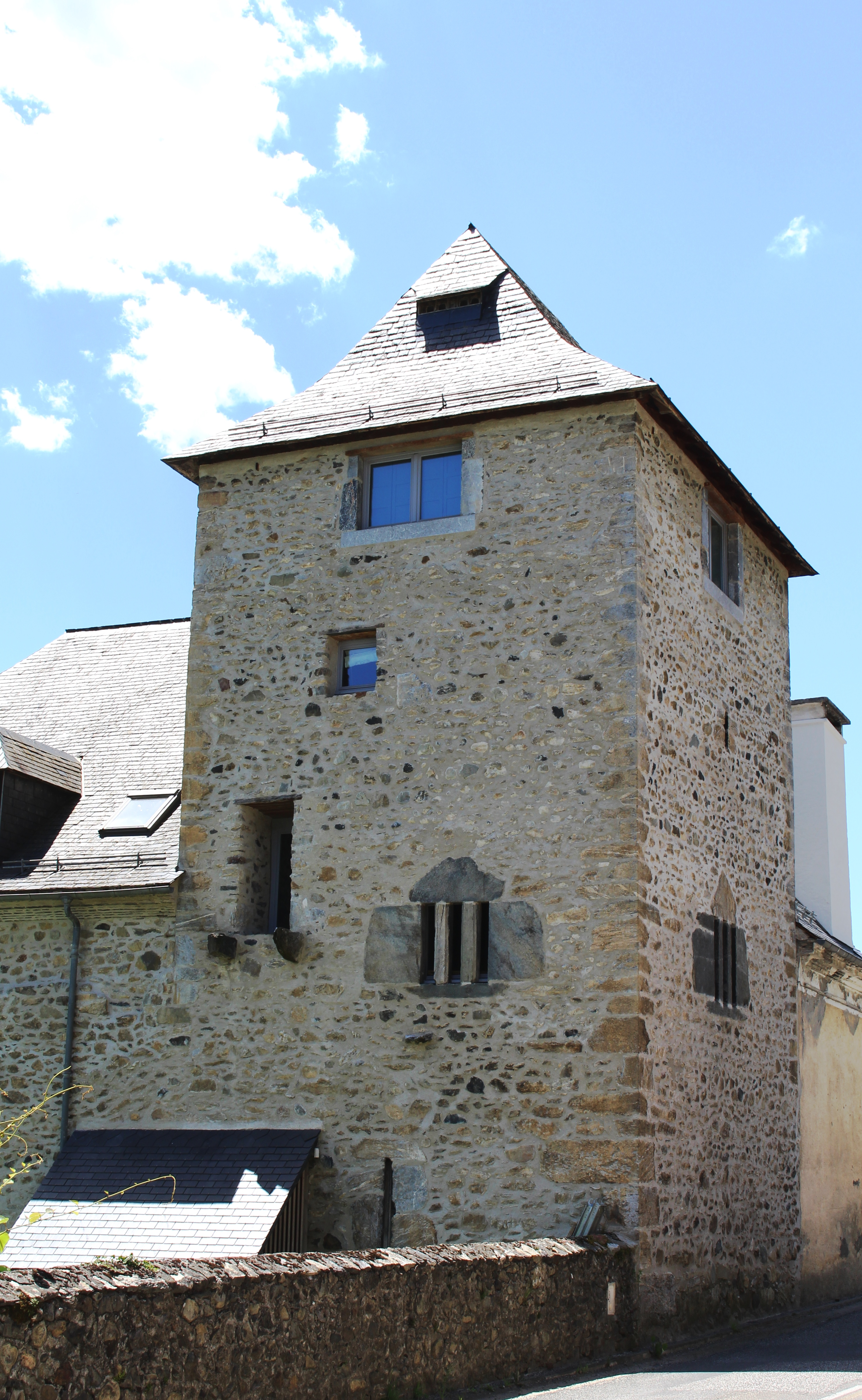 Tour d'Aucun (Hautes-Pyrénées)